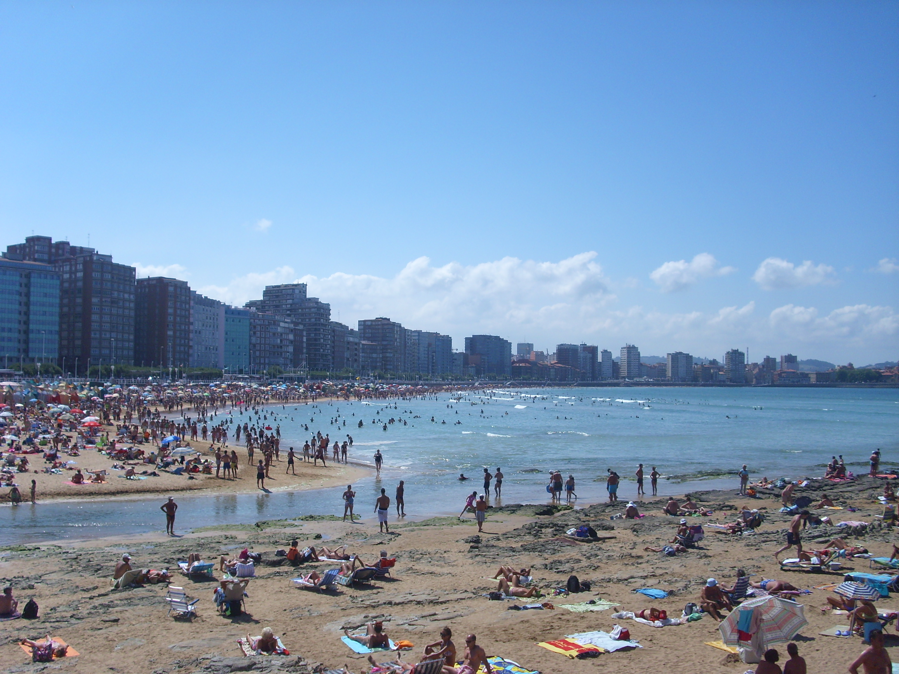 Playa de San Lorenzo, desembocadura del río Piles